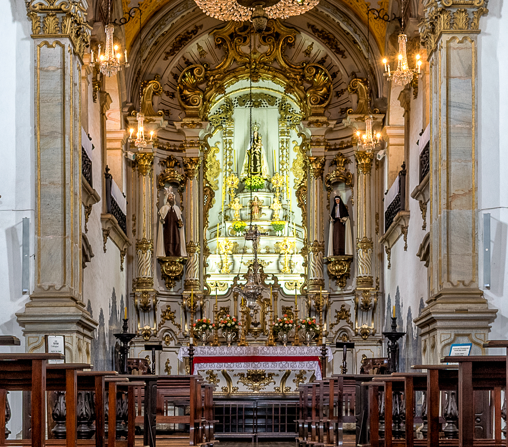 Altar da Igreja Nossa Senhora do Carmo. Projeto e douração de Mestre Ataíde